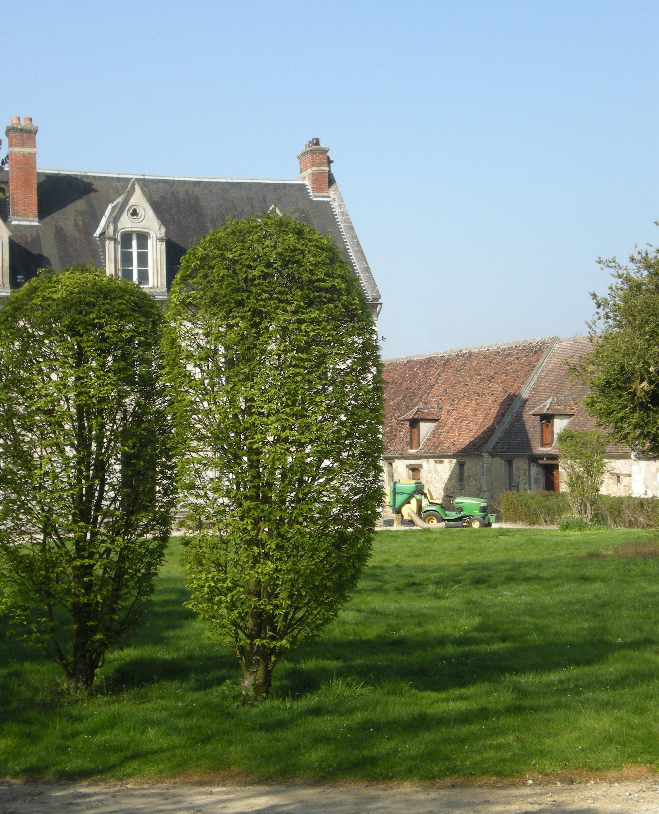 Le château et la grande des étournelles à Breuil-le-Sec.